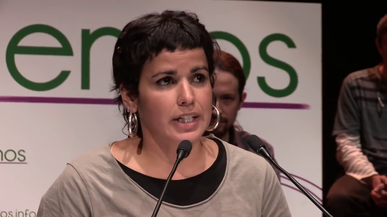 Presentación de Podemos en Madrid (16 de enero de 2014)